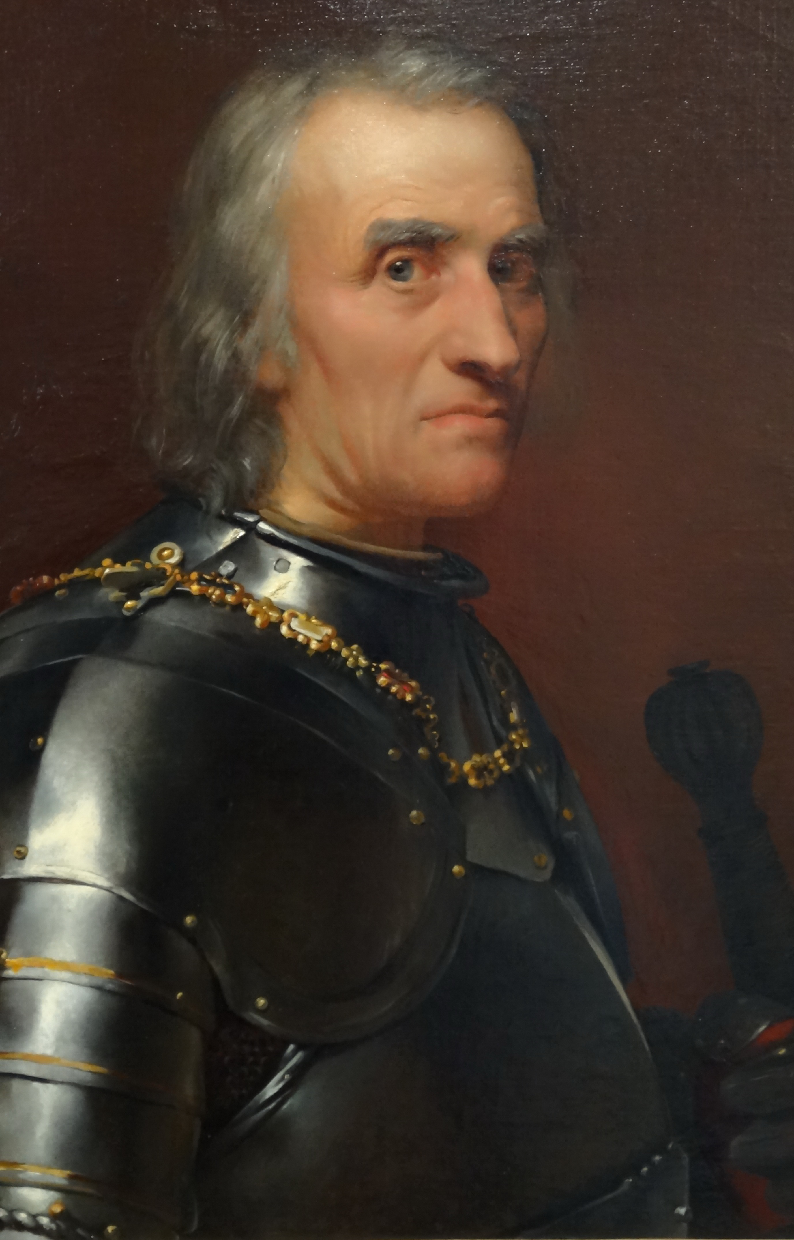 Портрет выполнен по заказу короля Луи-Филиппа для Исторического музея Версаля в 1834 году.